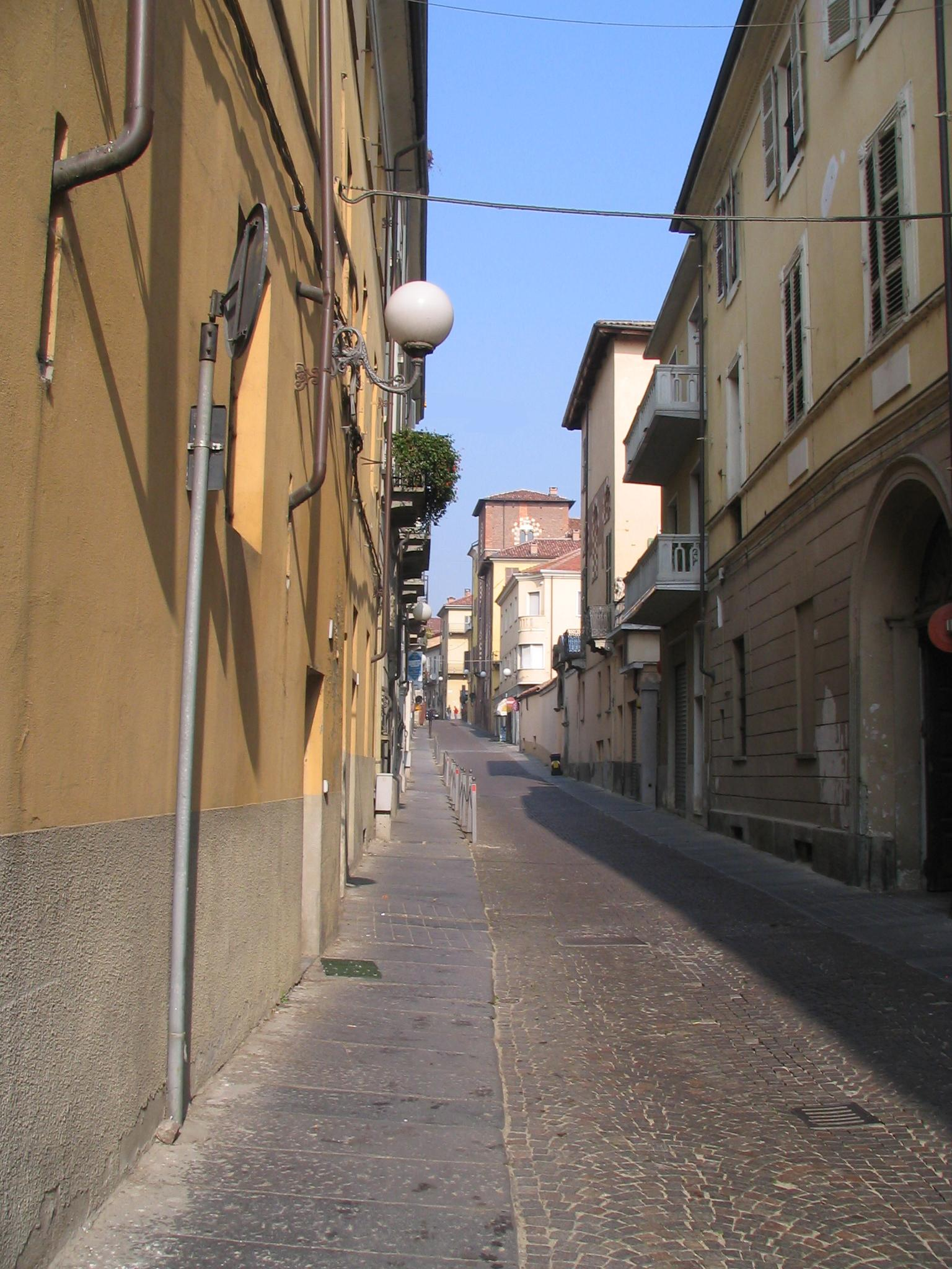 Asti,Roero street